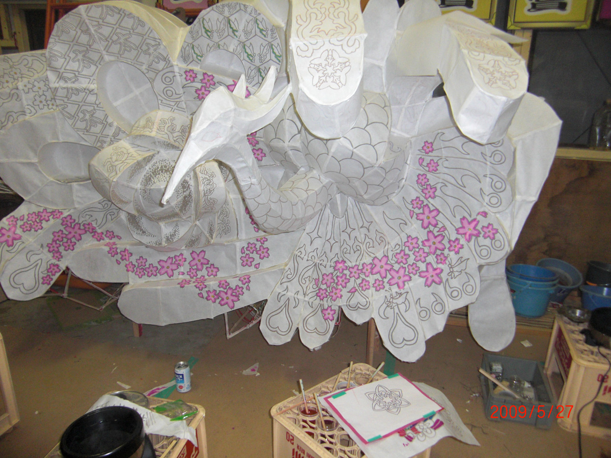 富山県砺波市で行われる夜高祭。行燈の制作過程です。